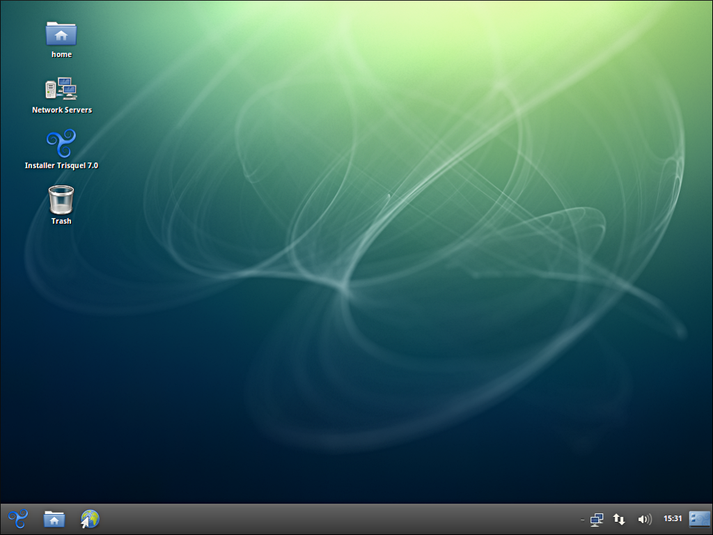 Trisquel GNU-Linux 7 Belenos (Capture png 1024x768px)